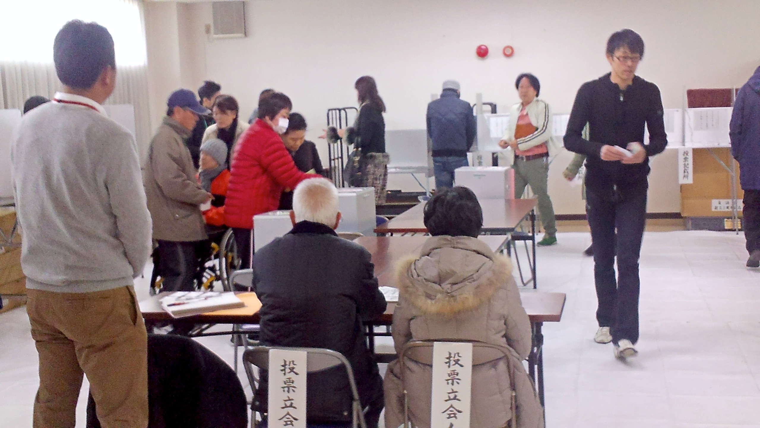 2014年衆議院議員選挙投票会場（2014年12月 MASA (talk)が東大阪市内で撮影）